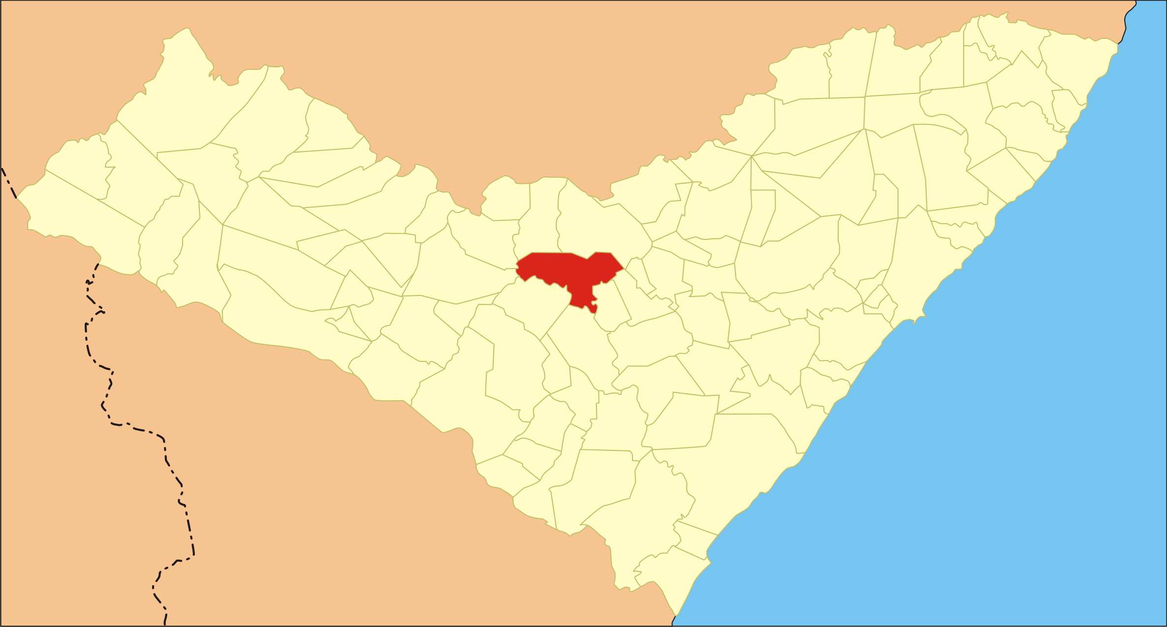 Localização da cidade em Alagoas